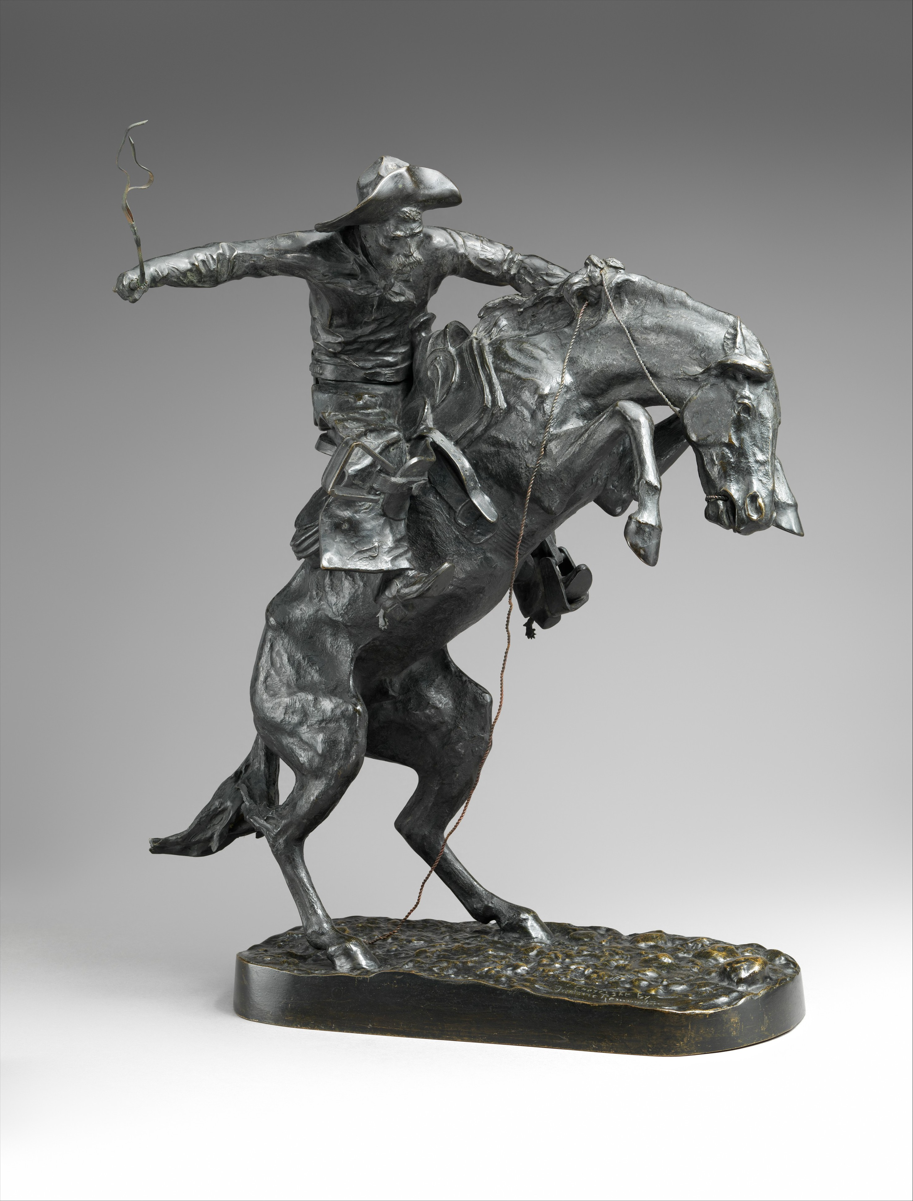 Sculpture; Sculpture